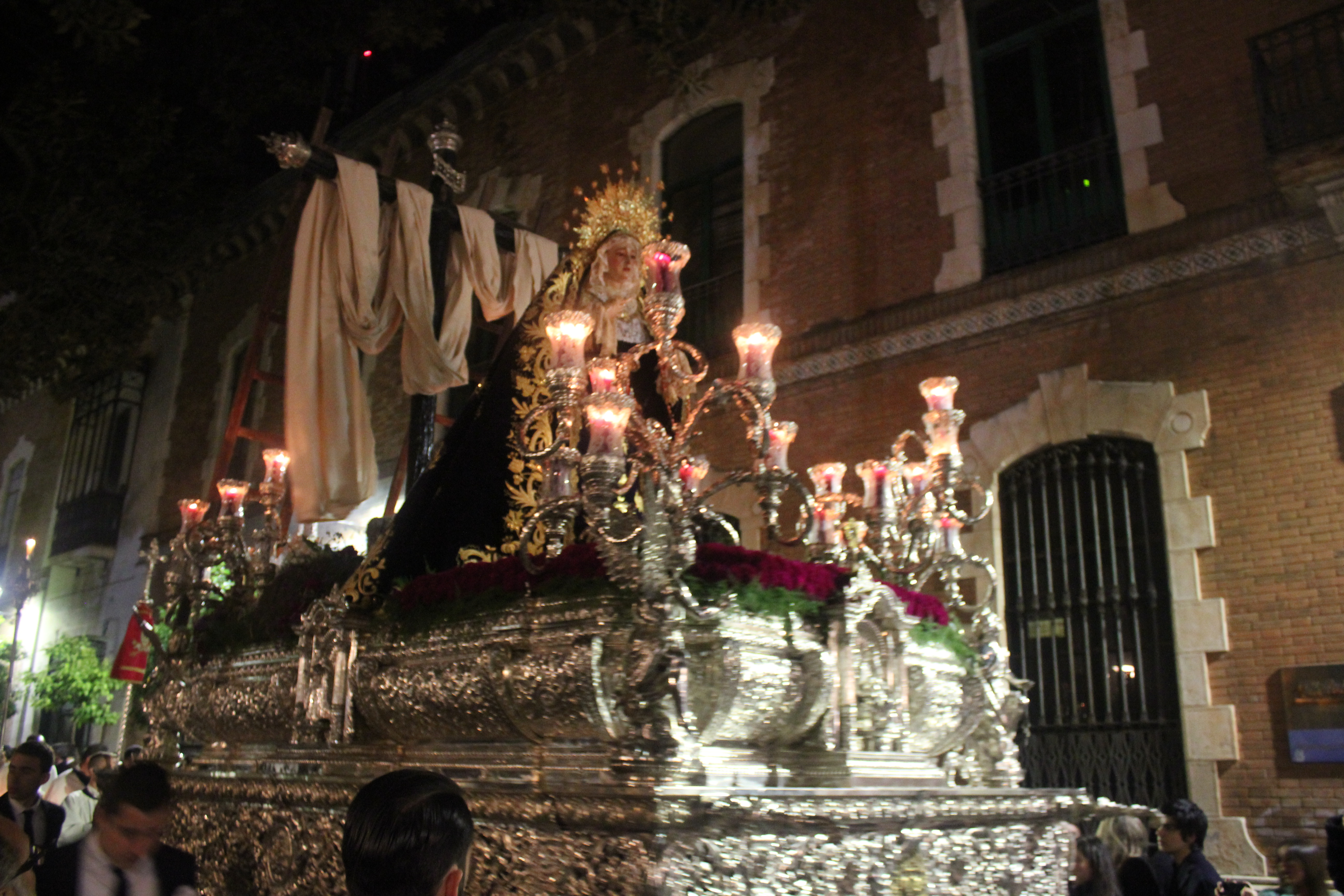 Hermandad de Loreto procesionando en la Semana Santa de Jerez de la Frontera 2016 (Andalucía, España) This is a photography of a Folklore festival in Spain (Wikidata id Q6124533).